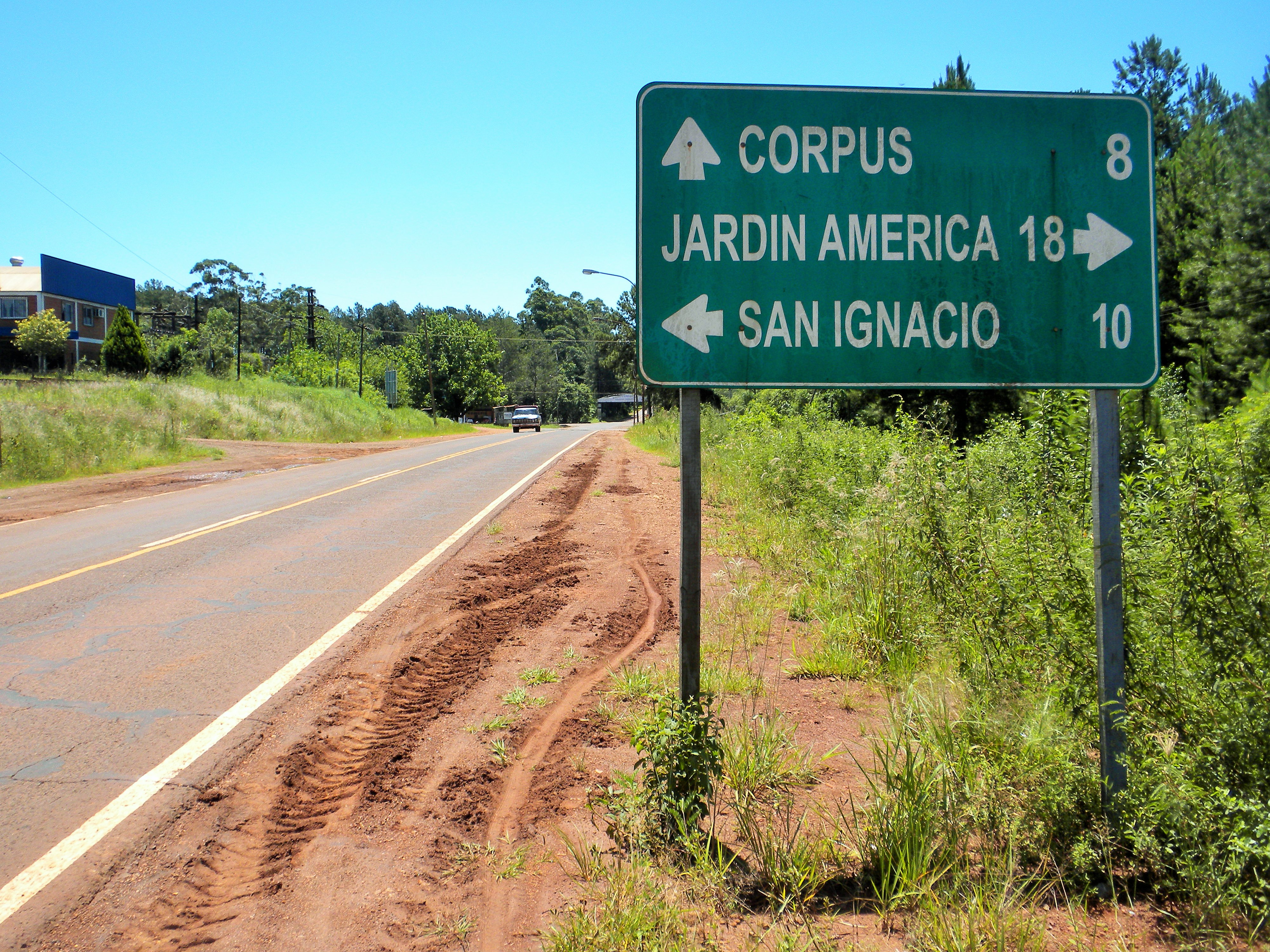 Cartel ubicado en Gobernador Roca, Provincia de Misiones, Argentina sobre Ruta Provincial 6. A Corpus 8, a Jardín América 18 y a San Ignacio 10. Fuenteː Periodista Horacio Cambeiro.